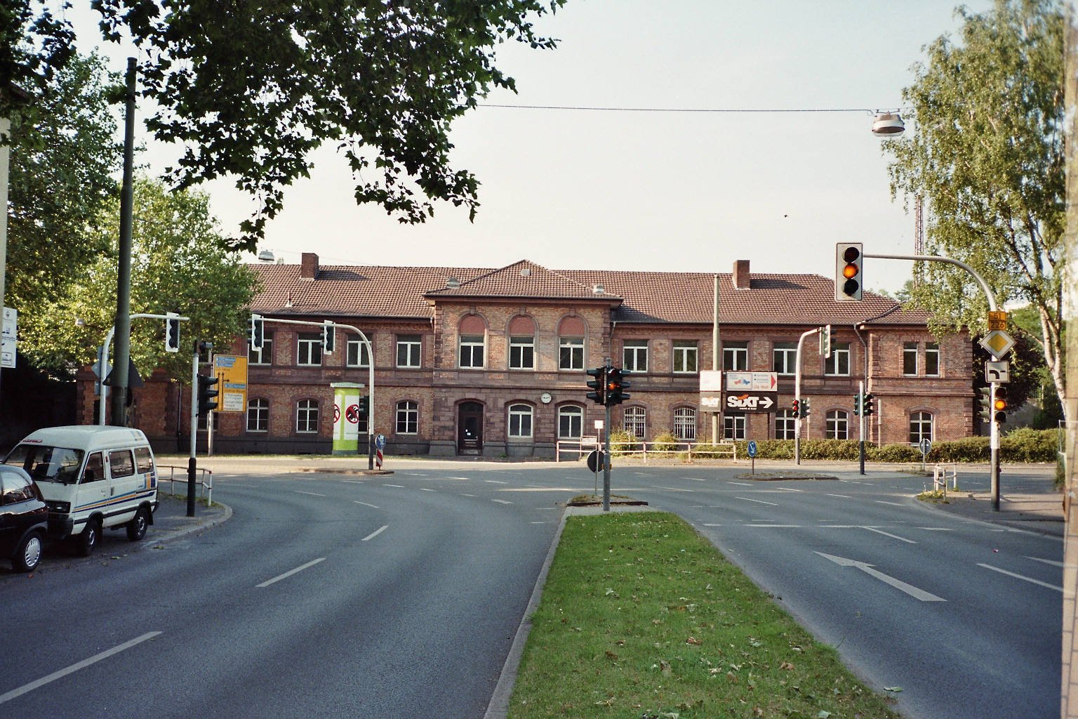 Der ehemalige Nordbahnhof in Bochum Eigenes Bild